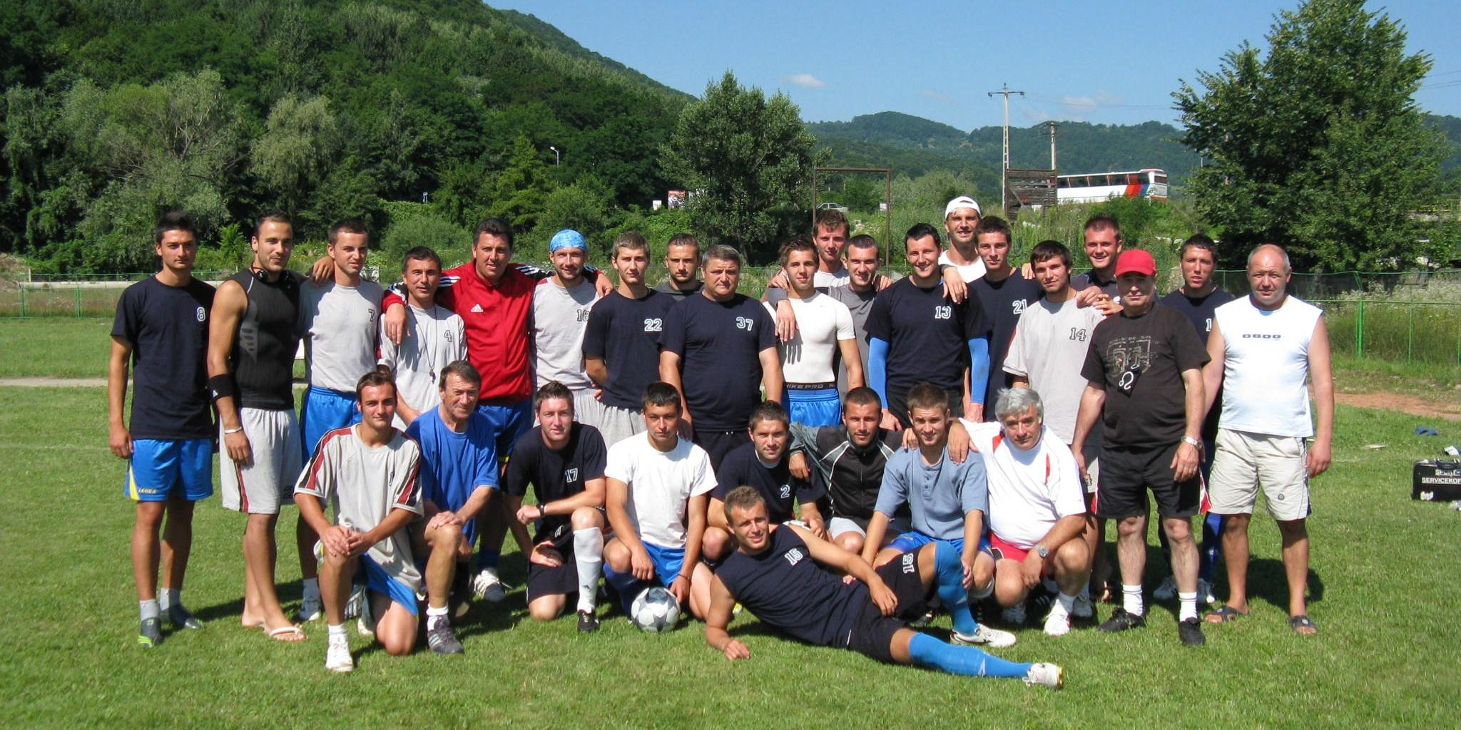 Echipa FCM Bacău, Lotul echipei.